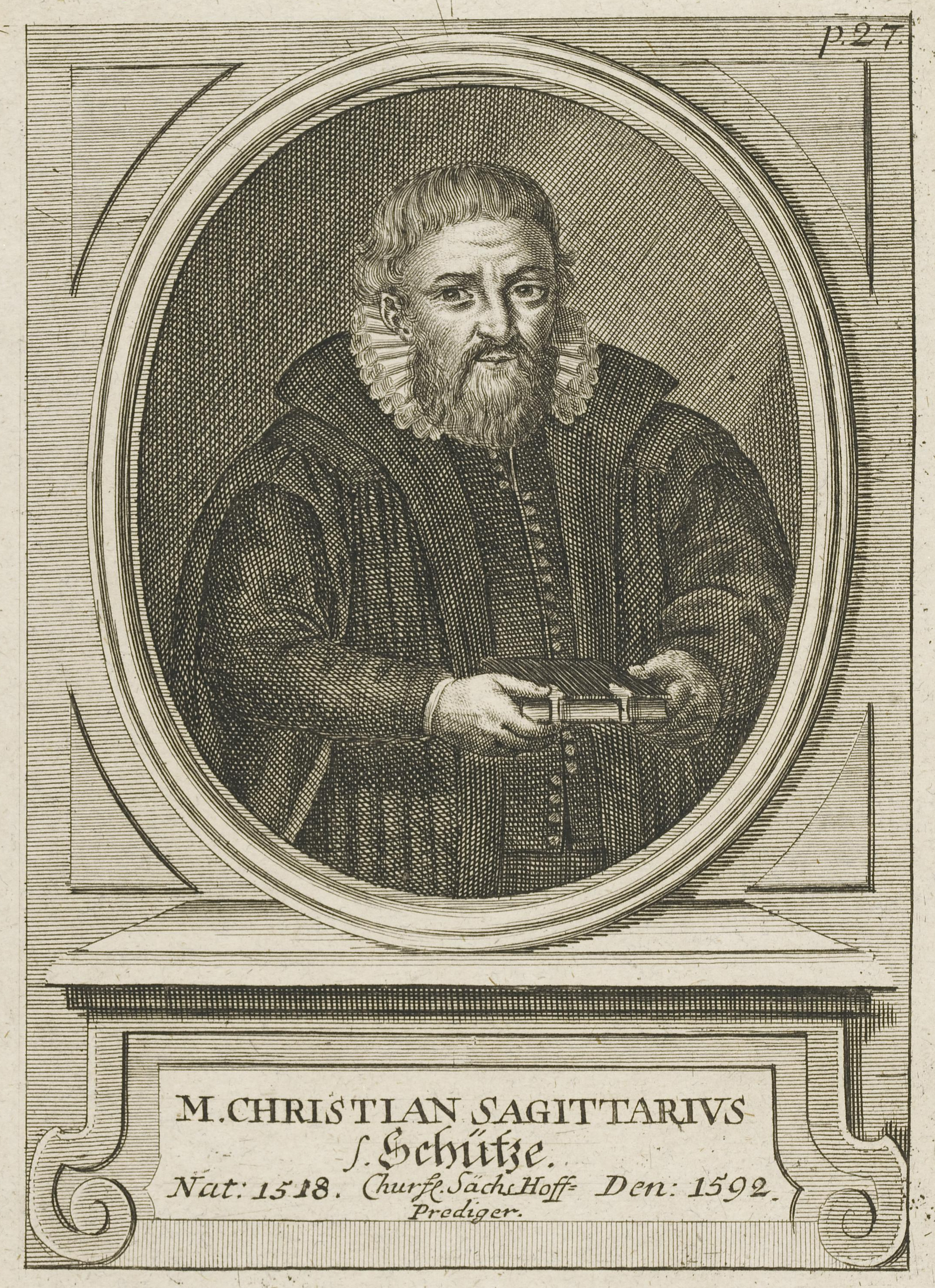 Bildnis des Christian Sagittarivs, sive Schütze; Leipzig, Universitätsbibliothek Leipzig, Porträtstichsammlung, Inventar-Nr. 44/16